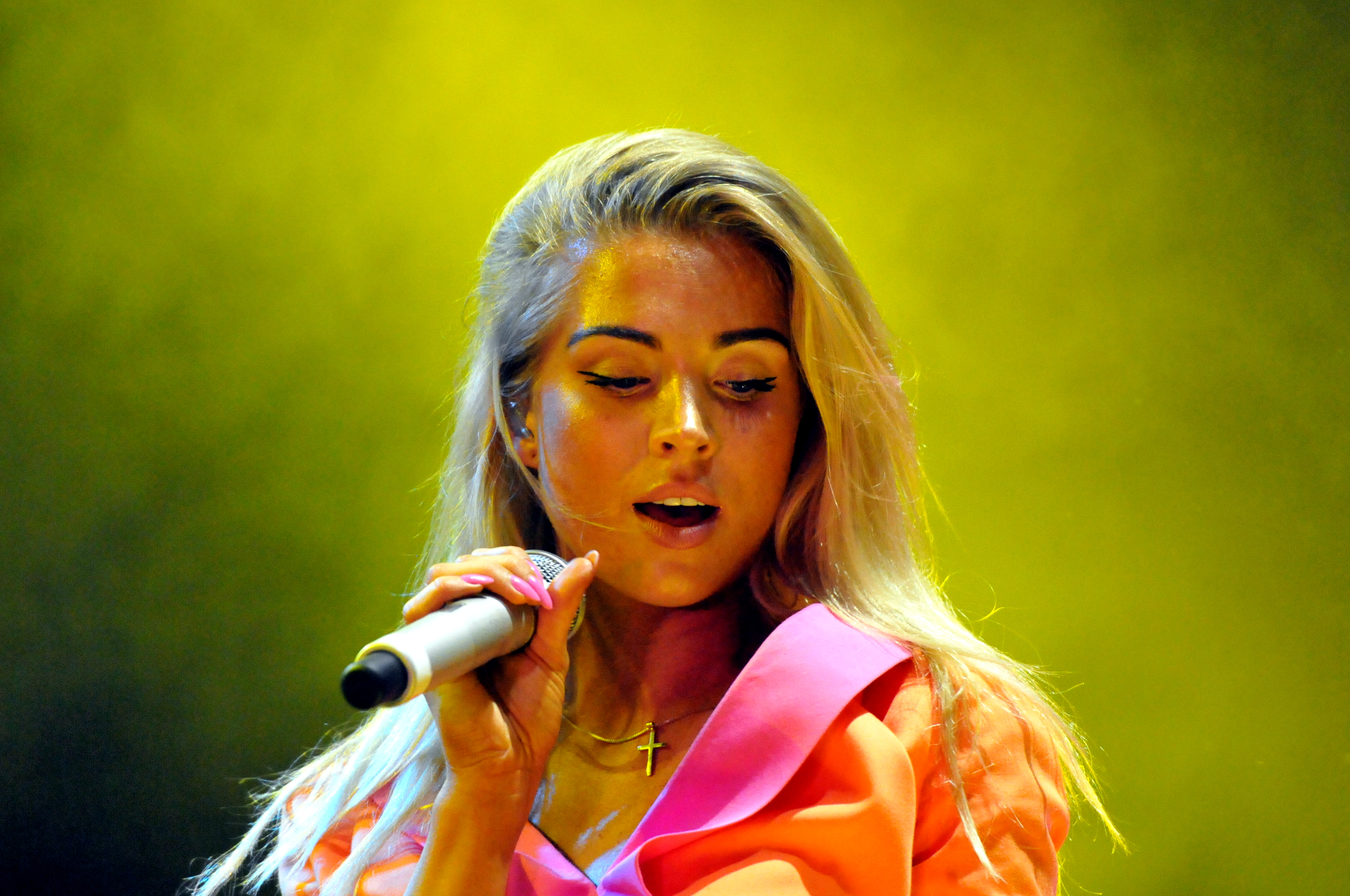 DSDS - Live on Tour. 27. Juli 2014, Stadthalle Wien.